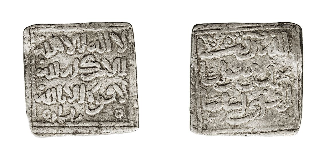 Dírham almohade anònim, emès a Bejaïa. En plata